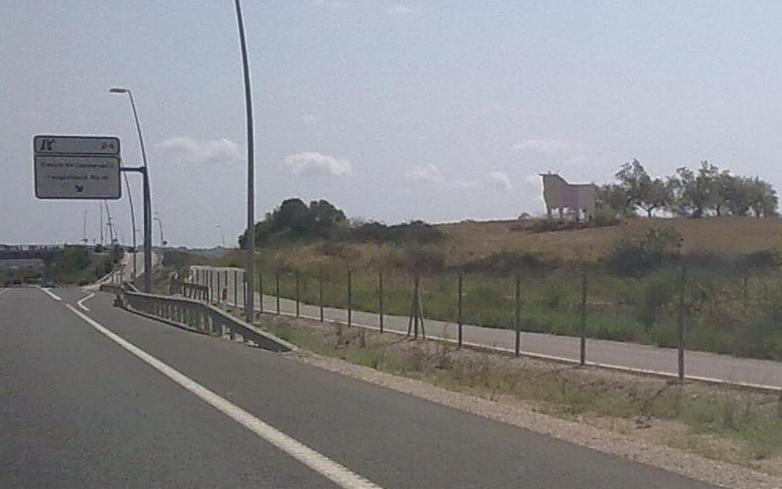 Imatge retallada no gaire bona. Provisional fins que qualcú en carregui una de millor. El bou té el cap tallat.